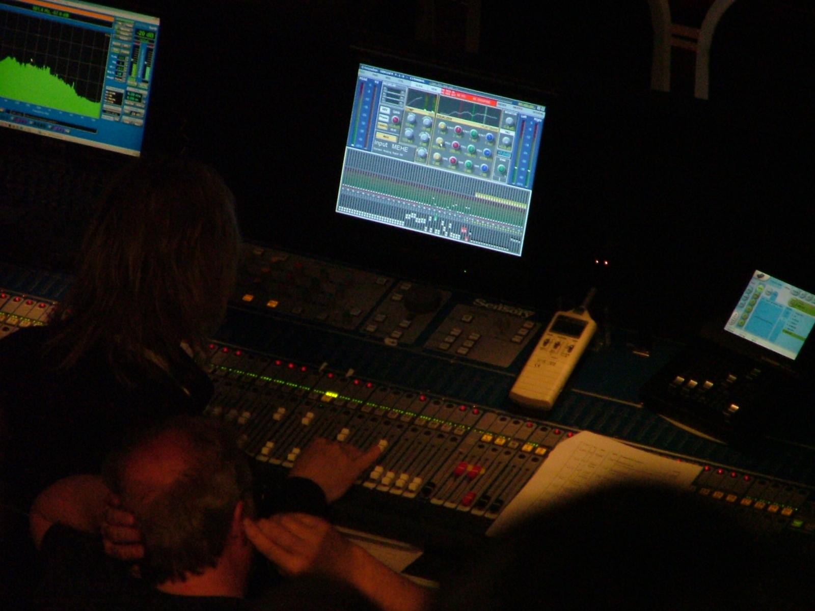 Dos botonets de rès Innovason Sensory digital mixer